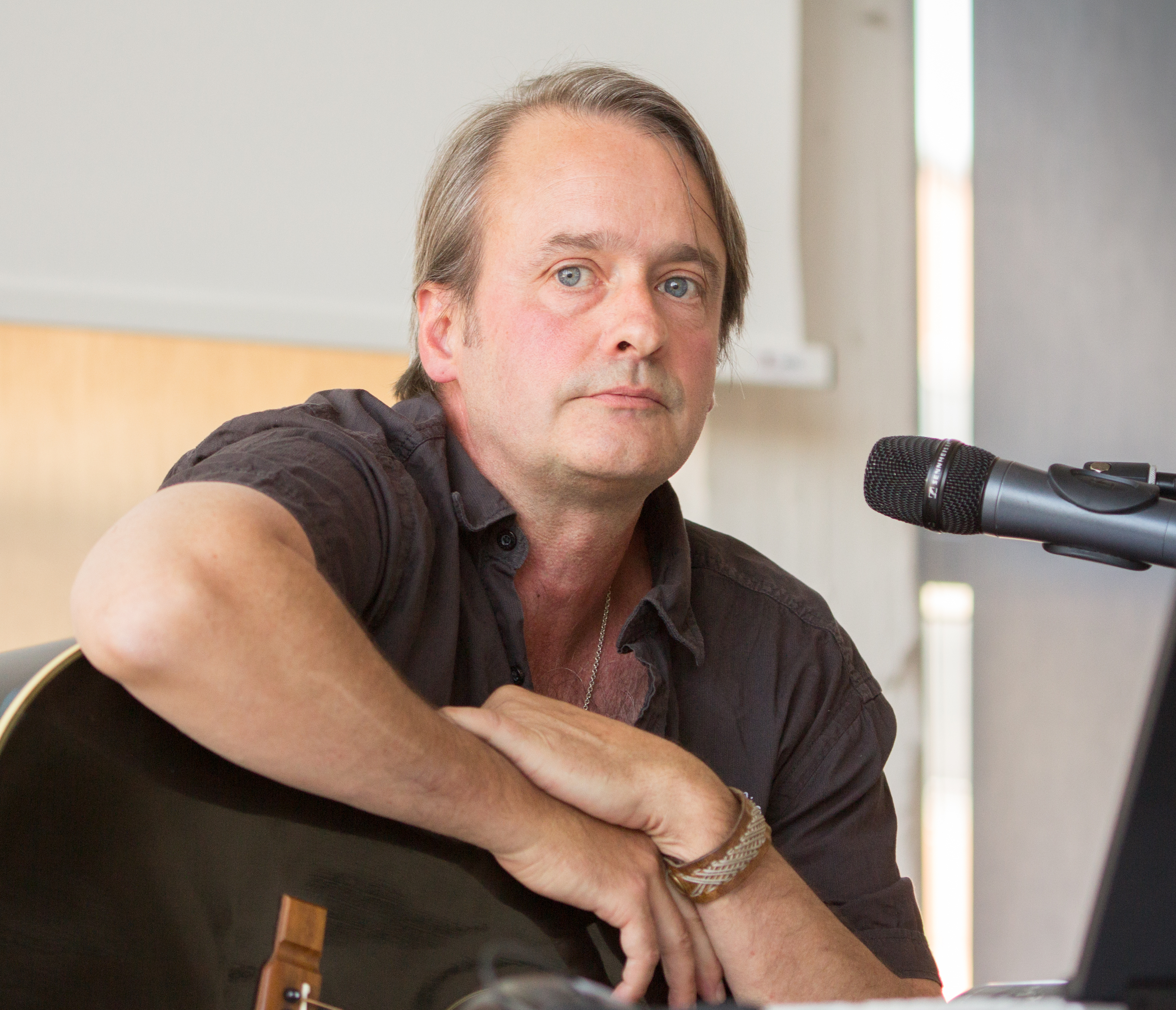 Bernd Imgrund erzählt aus seinem „Köln-Album“, Foyer des Bastei Lübbe Verlags während des Birlikte-Festivals in Köln-Mülheim 2015